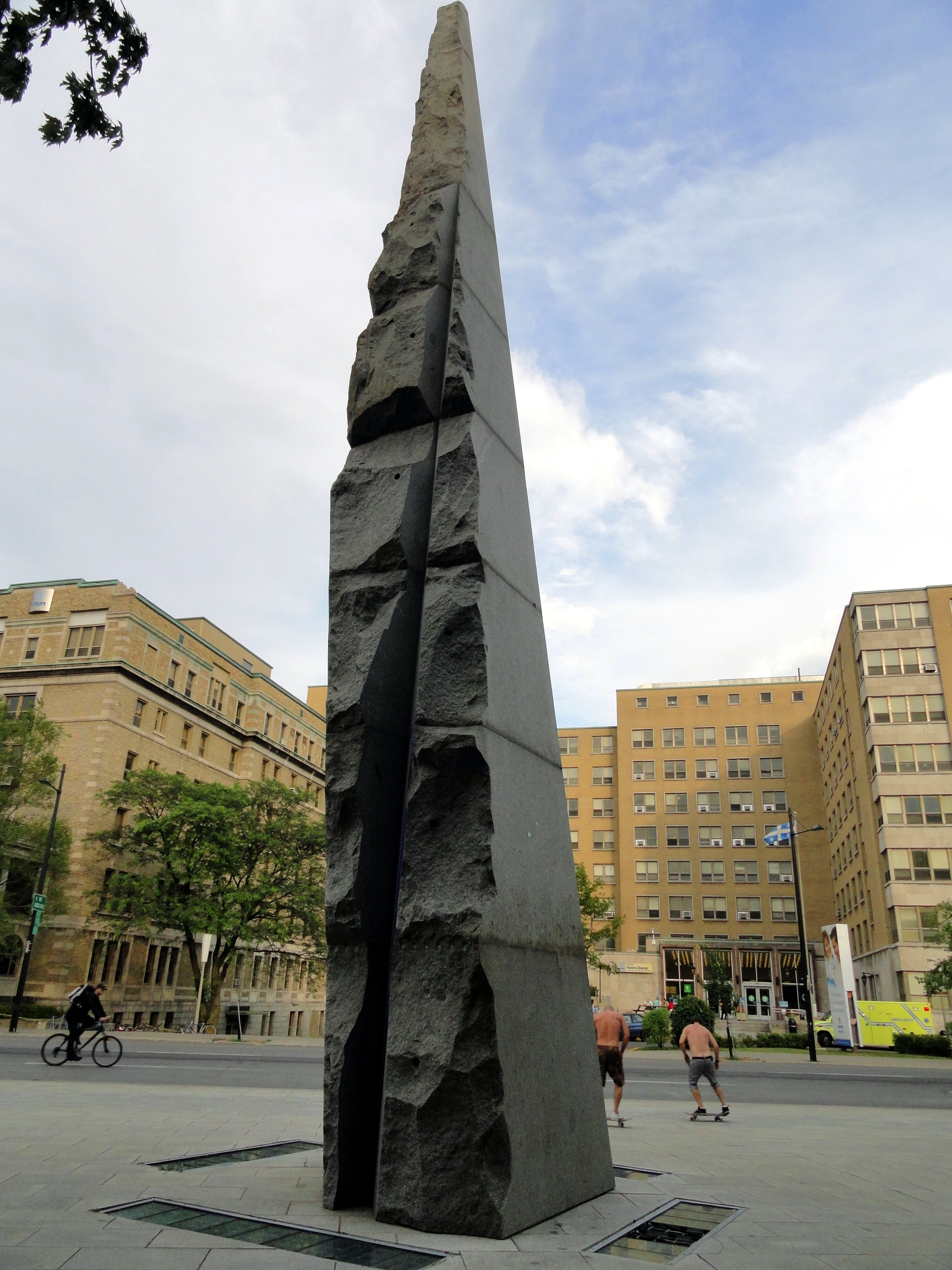 Parc Lafontaine, Montréal